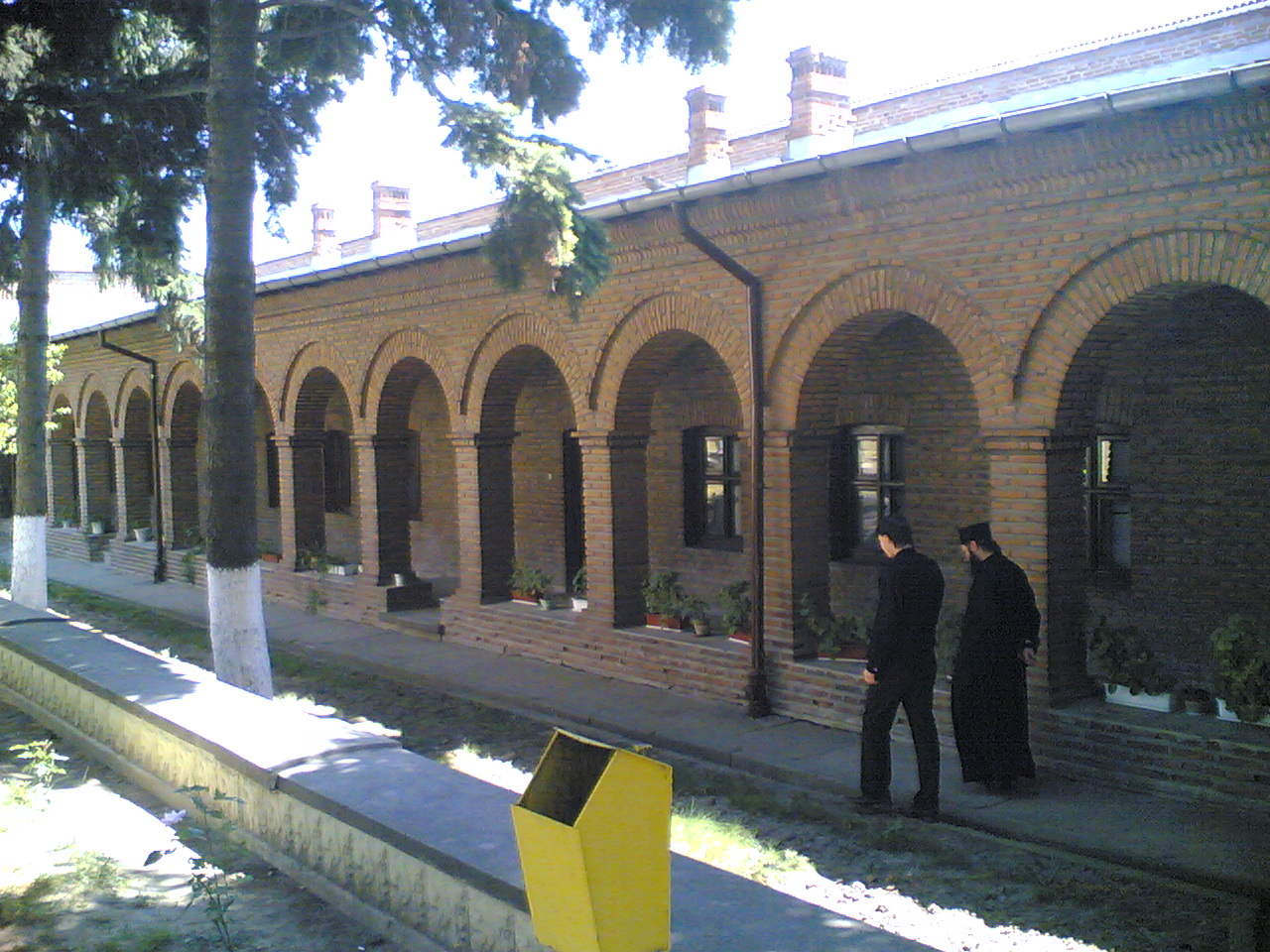 Mănăstirea Plumbuita. Fotografii facute personal la Manăstirea Plumbuita. Prin aceasta renunţ explicit la drepturile de autor.